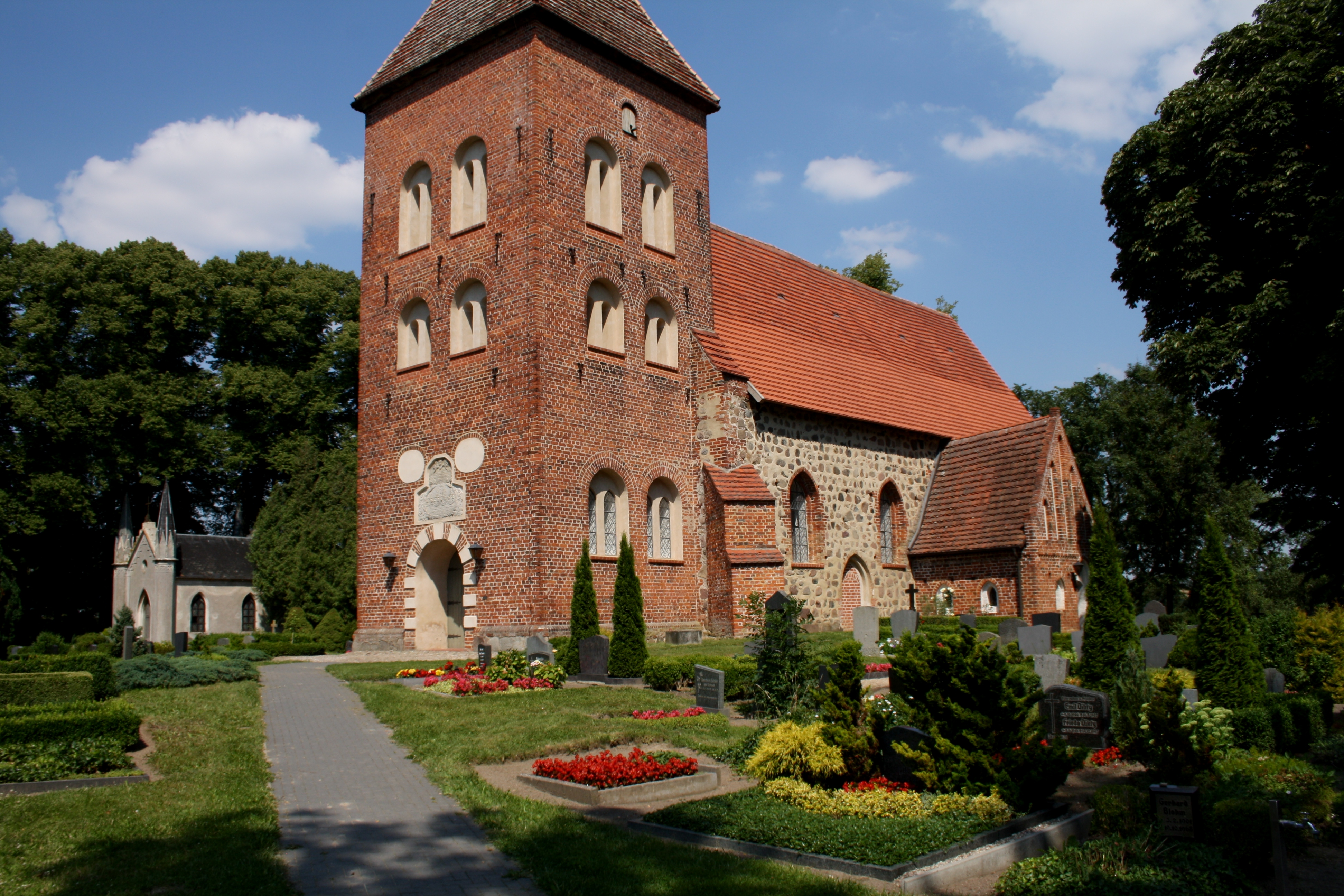 Dorfkirche Zittow